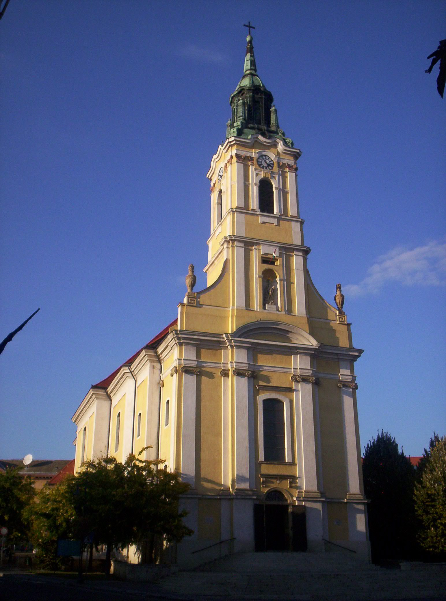 A szekszárdi Urunk Mennybemenetele római katolikus templom. Közép-Európa legnagyobb egyhajós katolikus temploma. Épült 1802-1805 között copf stílusban, tervezte Thallherr József (1730-1807). – photo taken by uploader User:Csanády in 2006.